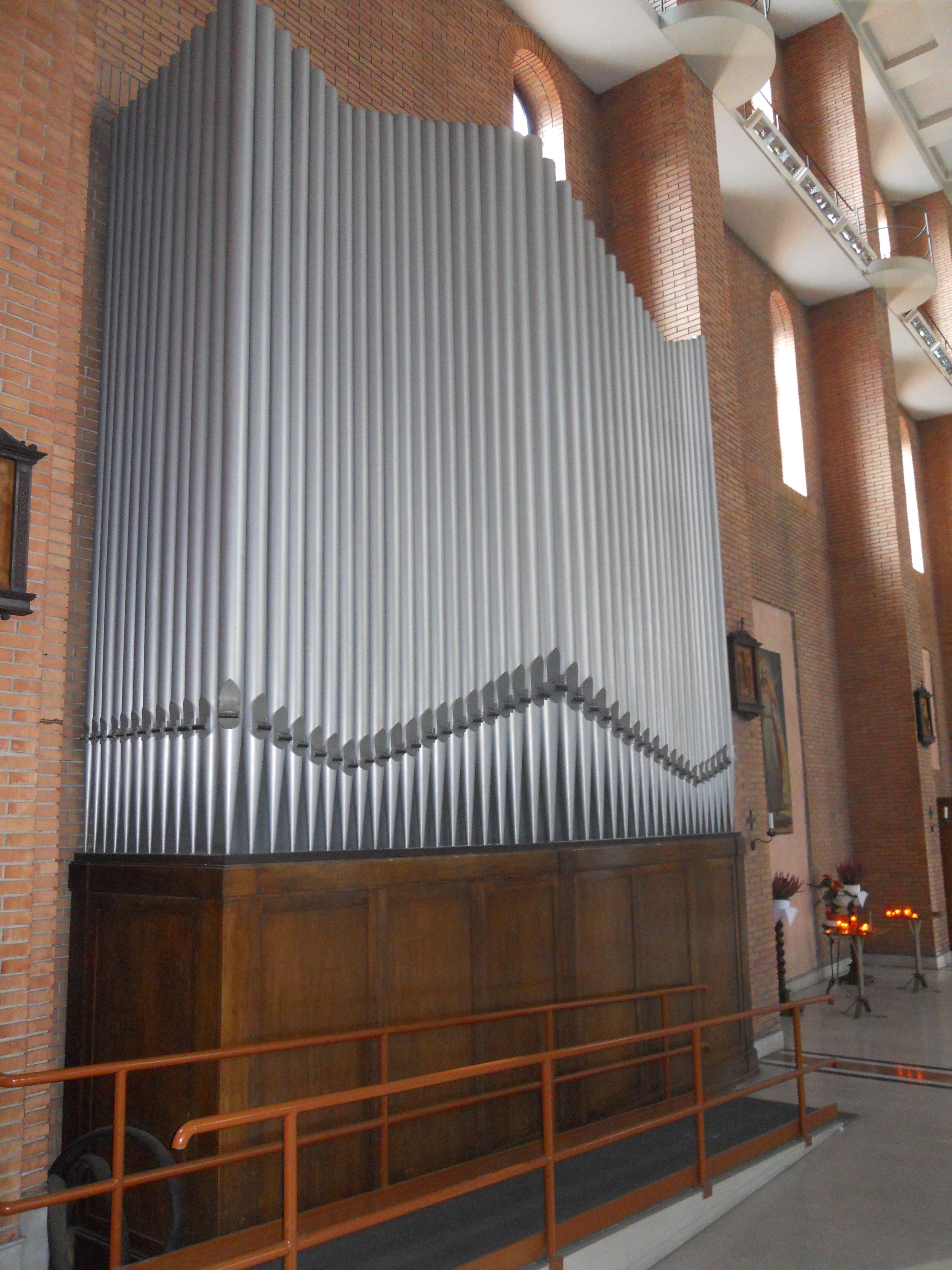 L'organo a canne Balbiani della chiesa dei Santi Silvestro e Martino in Milano.